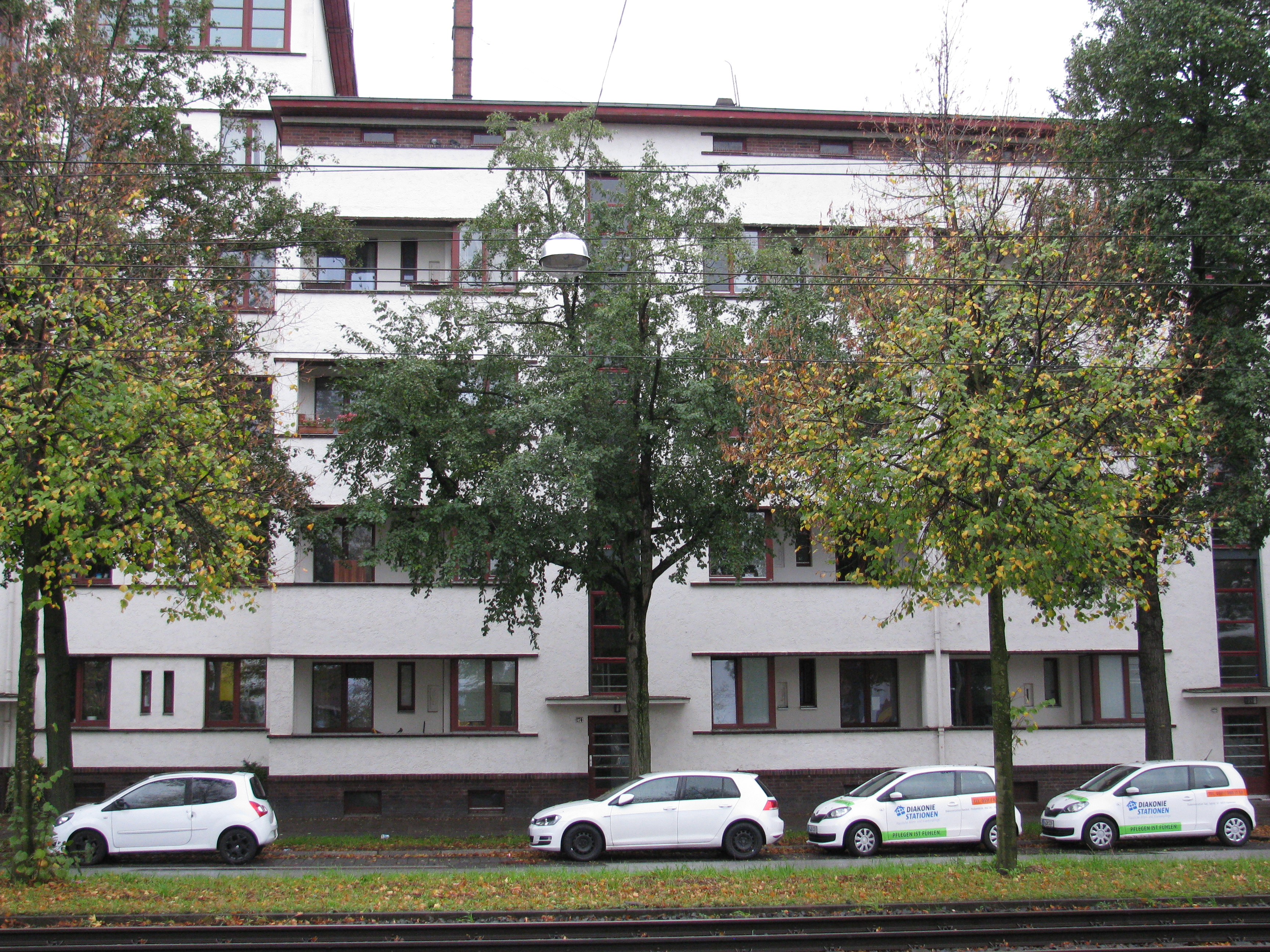 das Haus Podbielskistraße 274 in Hannover